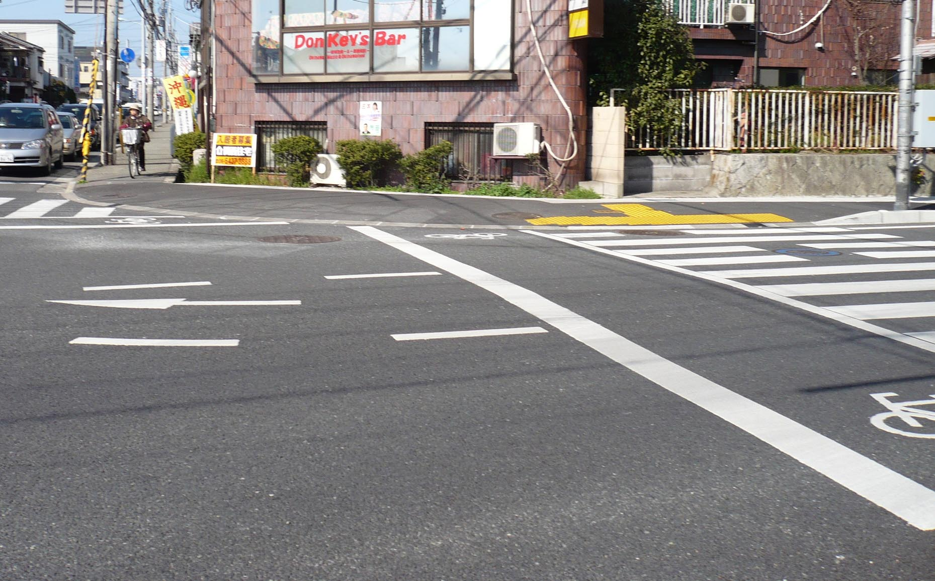 矢倉台跡推定地